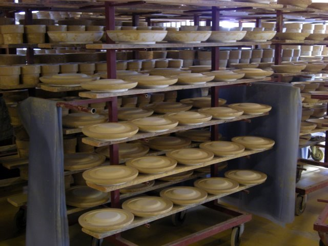 Nittsjö keramik.